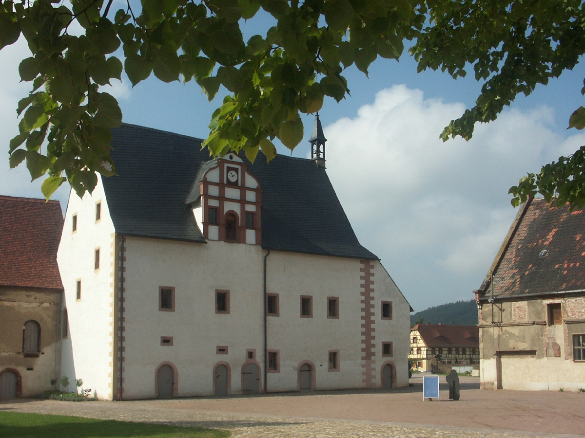 Kloster Buch: Die Hofseite des Kirchenbaus